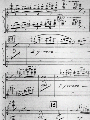 Composicion 4